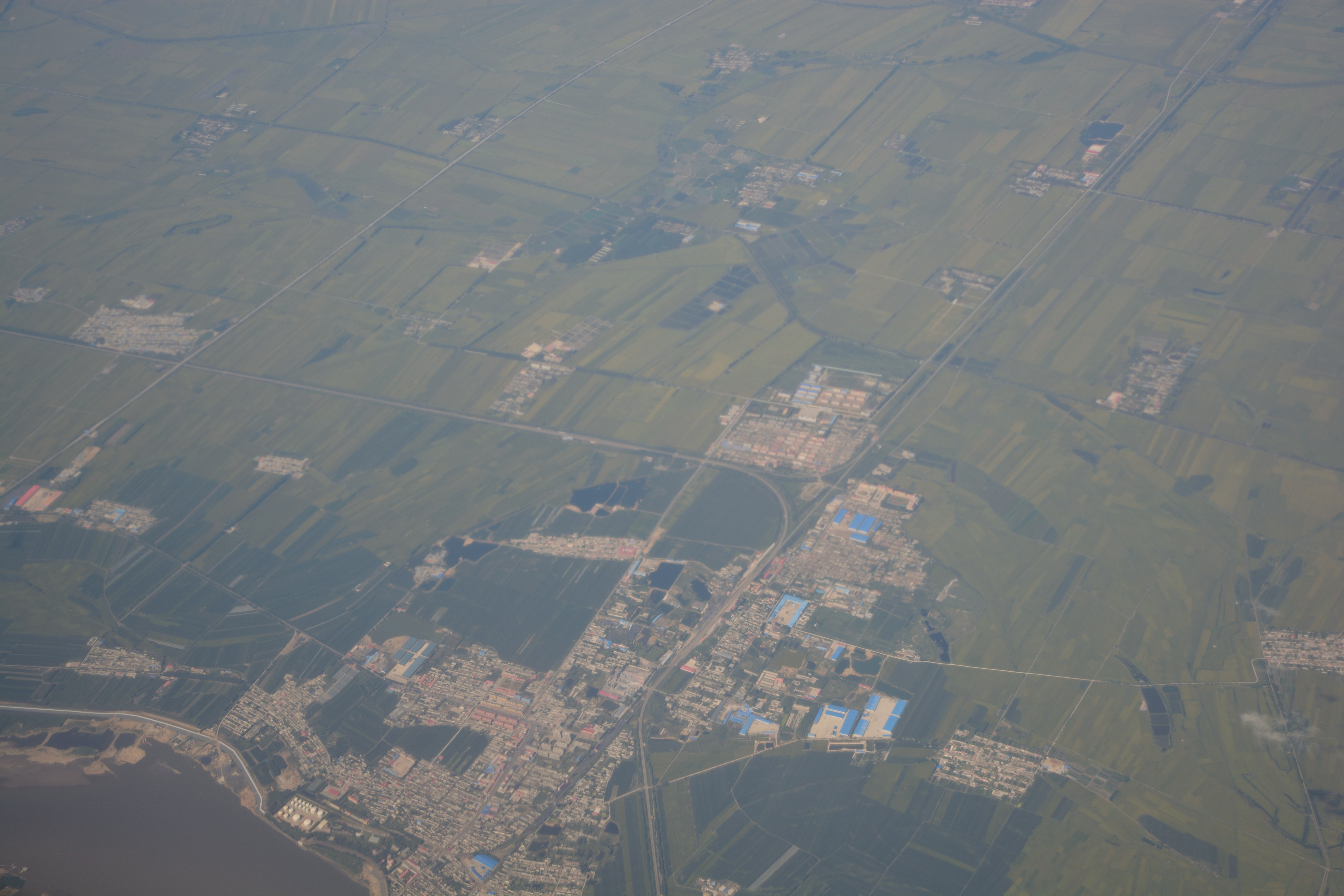 中华人民共和国黑龙江省佳木斯市莲江口镇